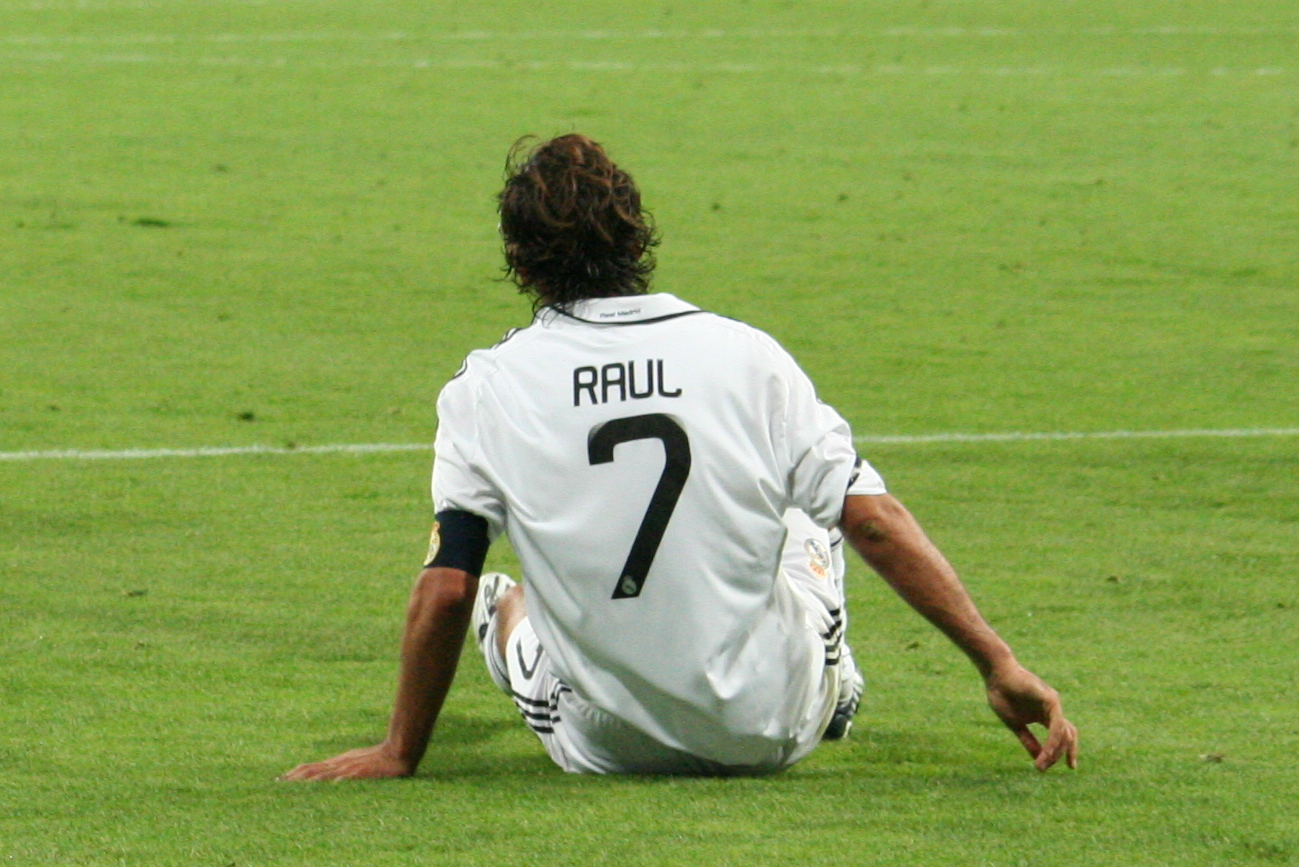 El capitán del Real Madrid Raúl González durante el partido de vuelta de la Supercopa de España 2008, en el Bernabéu.